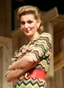 Rezes Judit magyar színésznő, balett-táncos.